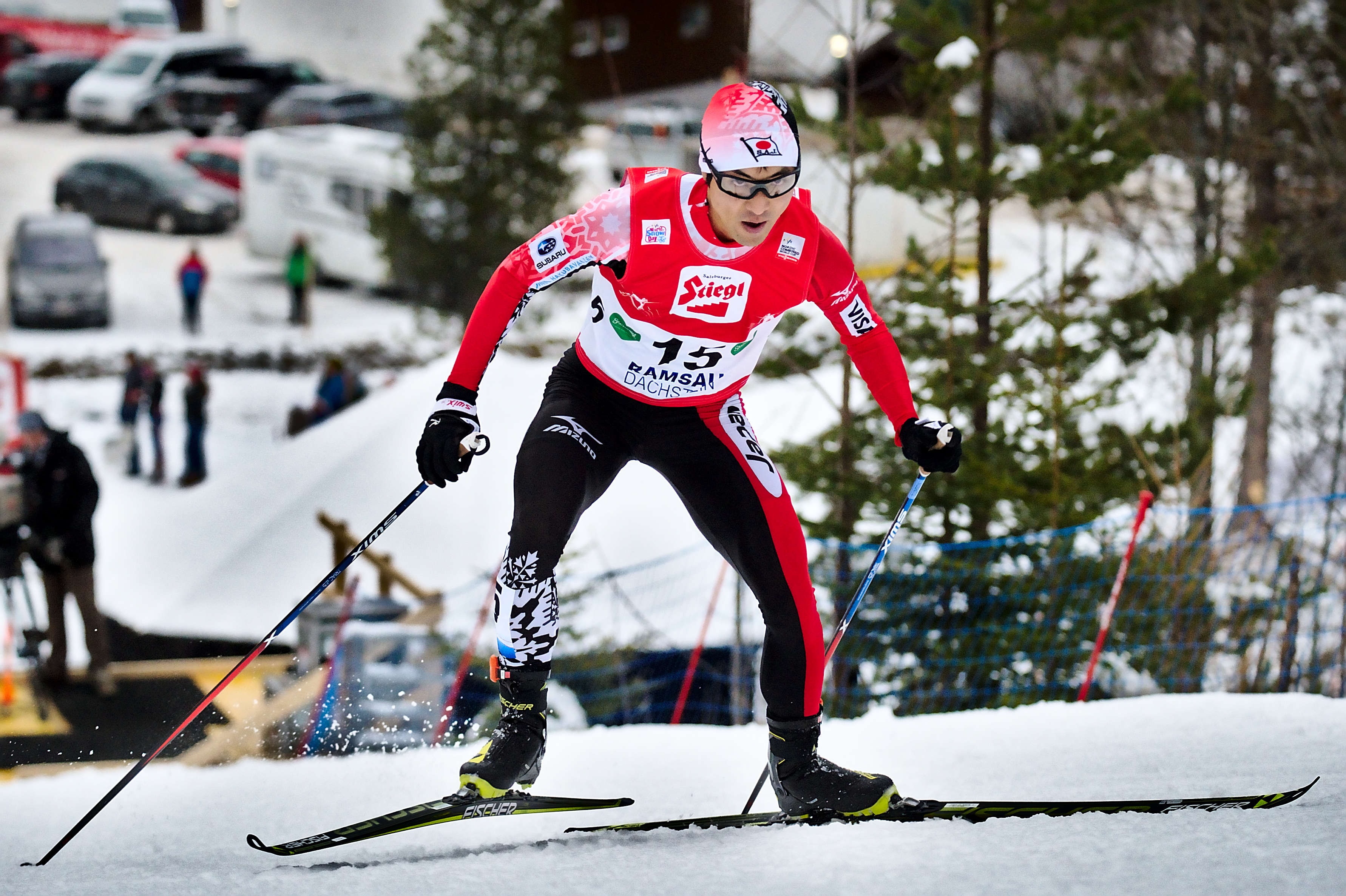 FIS Worldcup Nordic Combined Ramsau 2016. Bild zeigt Yoshito Watabe (JPN)